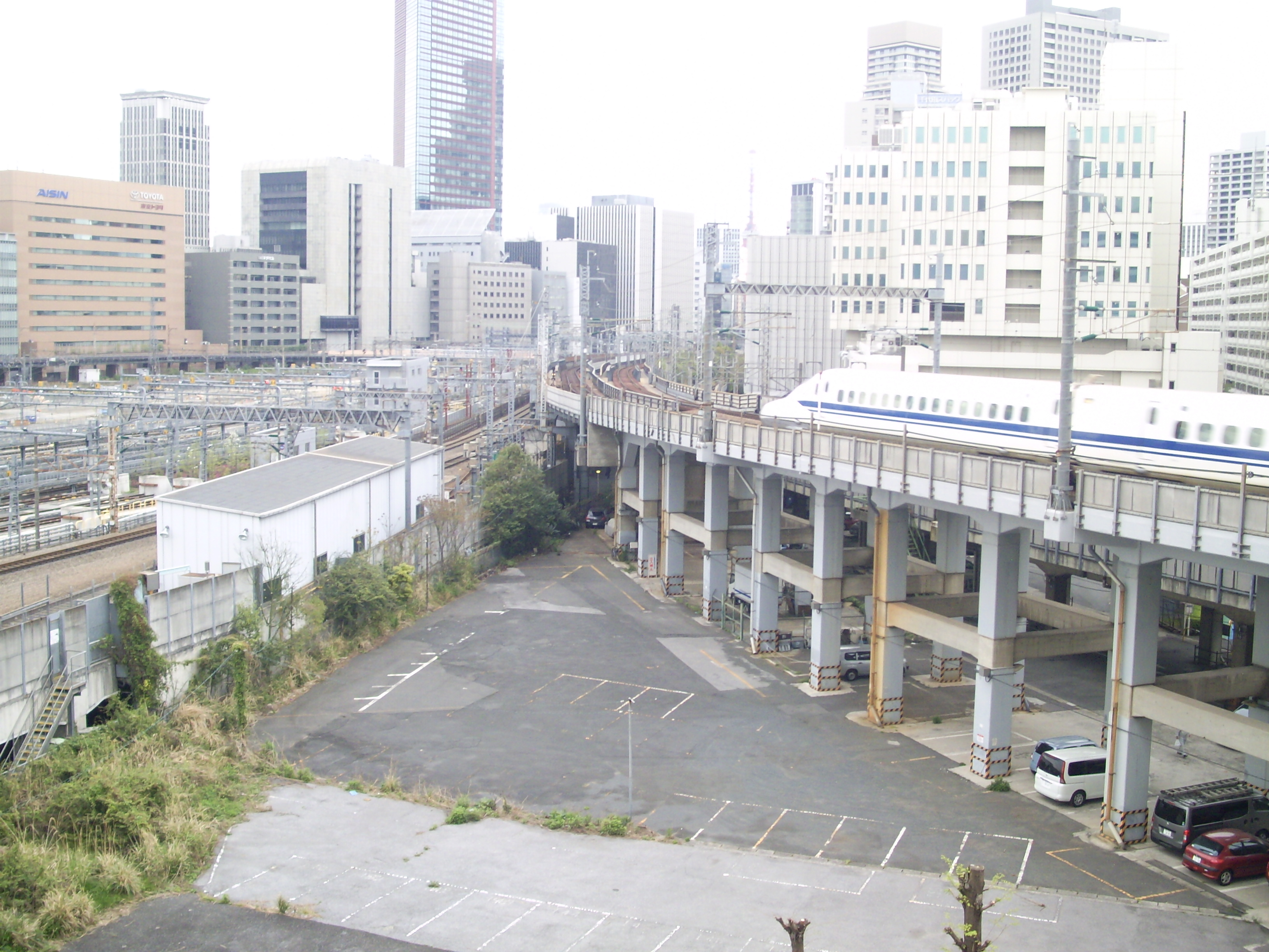 東海道新幹線大井車両基地引き込み線（車両走行中の右側高架橋）、左側が本線 ㊟カメラを起動すると日付機能が出荷時のものに初期化されるため、ファイル履歴の撮影日時とメタデータの原画像データの生成日時が異なります